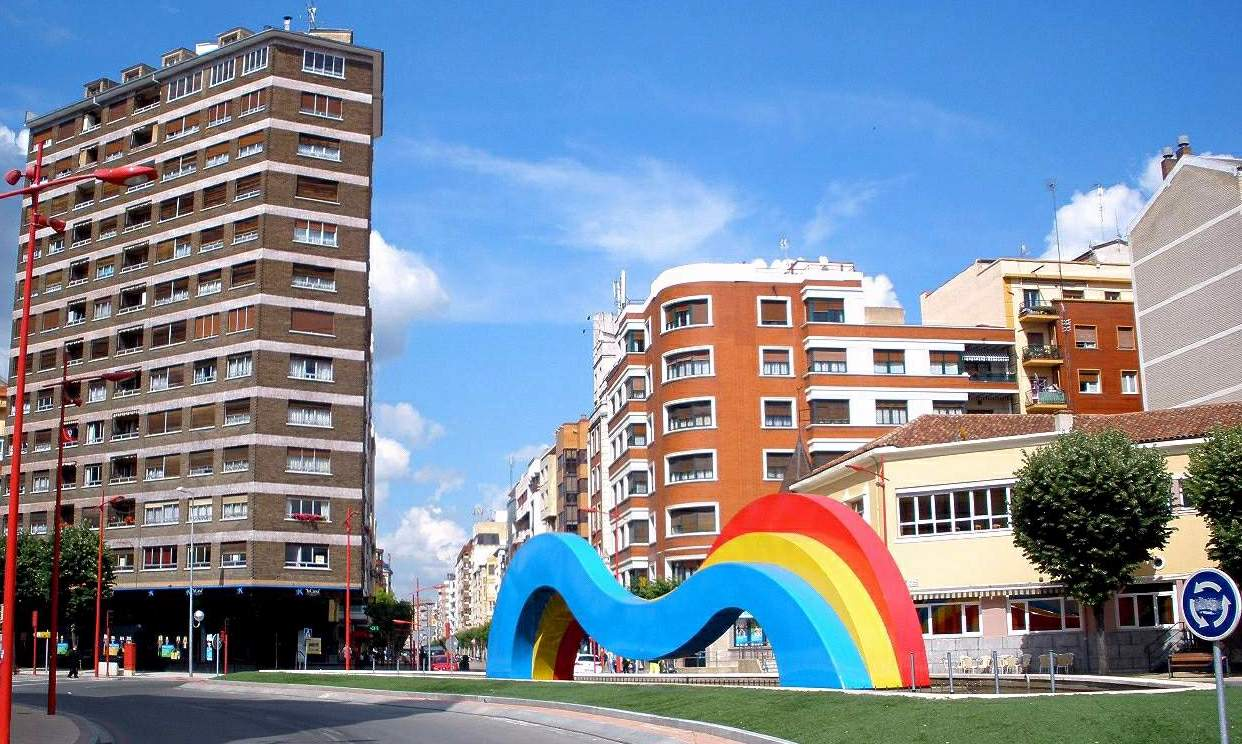 Miranda de Ebro - glorieta central y escultura 'Vivir Miranda'